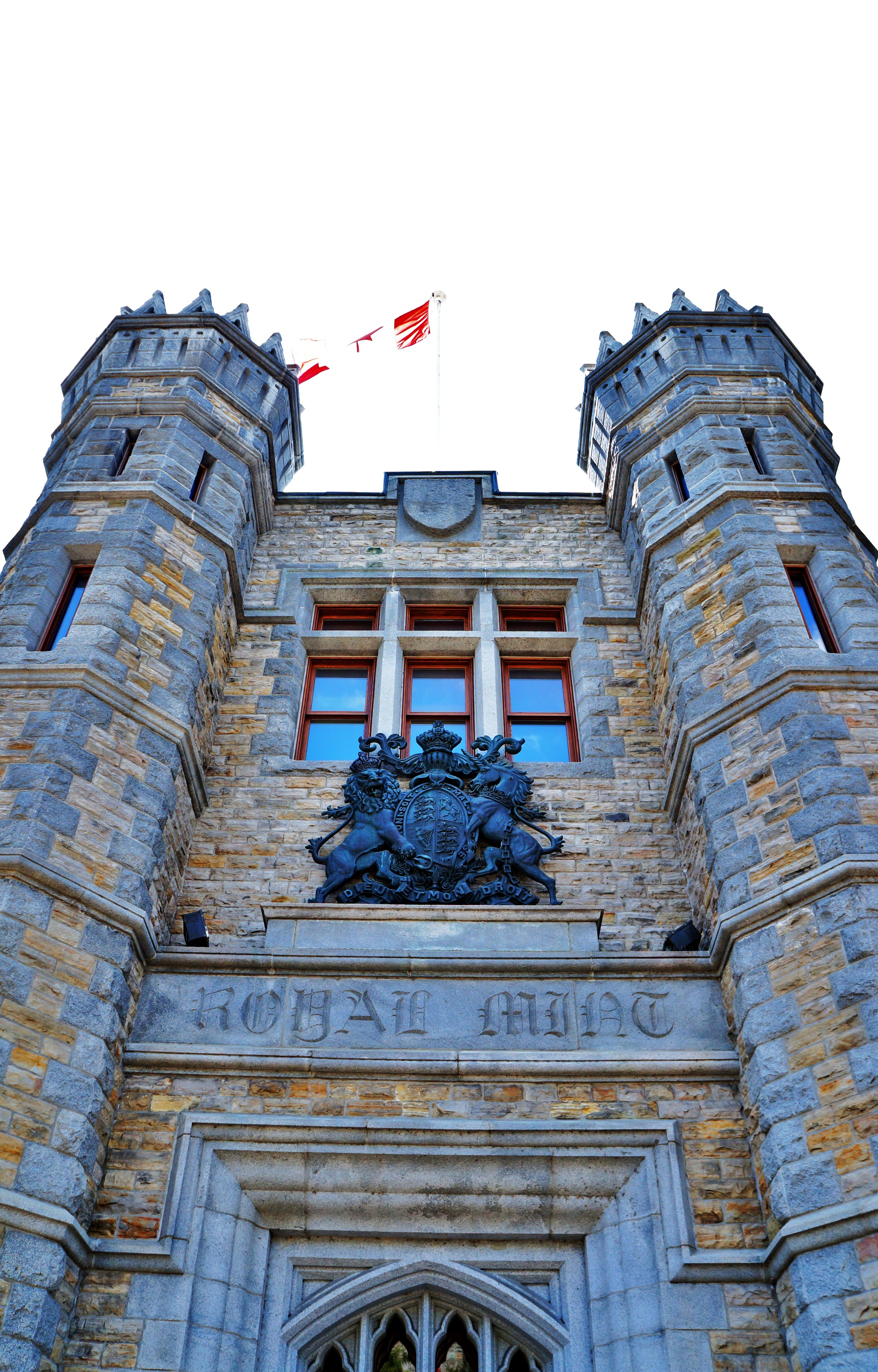 Royal Canadian Mint